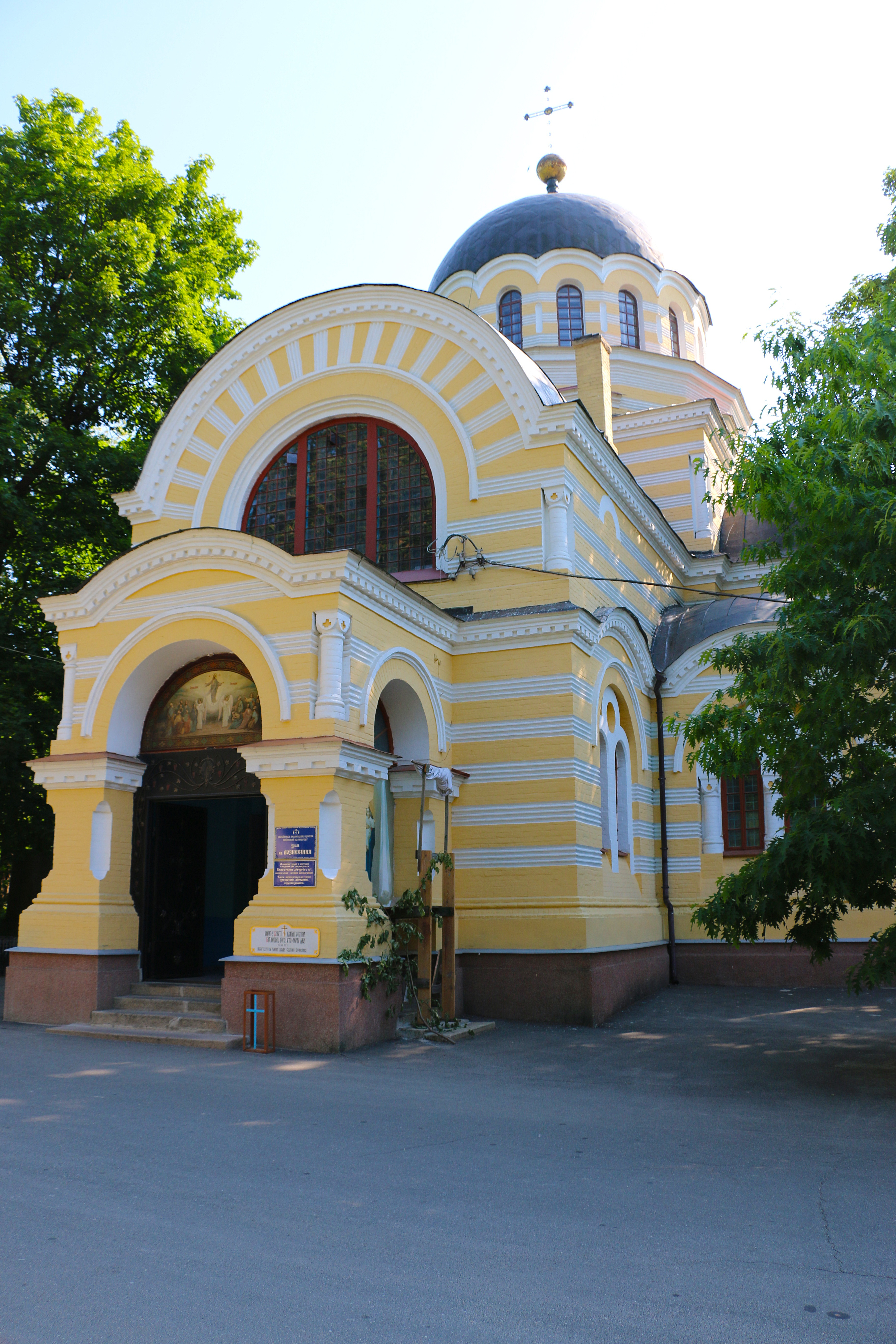 Вознесенська церква, Київ, Байкова вул., 6, діл. 6